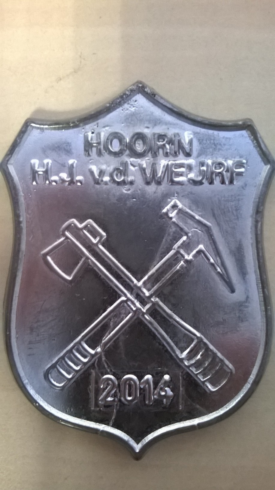 Modern trotseerloodje uit 2014. Een trotseerloodje wordt buiten gebruikt op nieuw aangebrachte lappen lood om spijkers e.d. af te dekken.